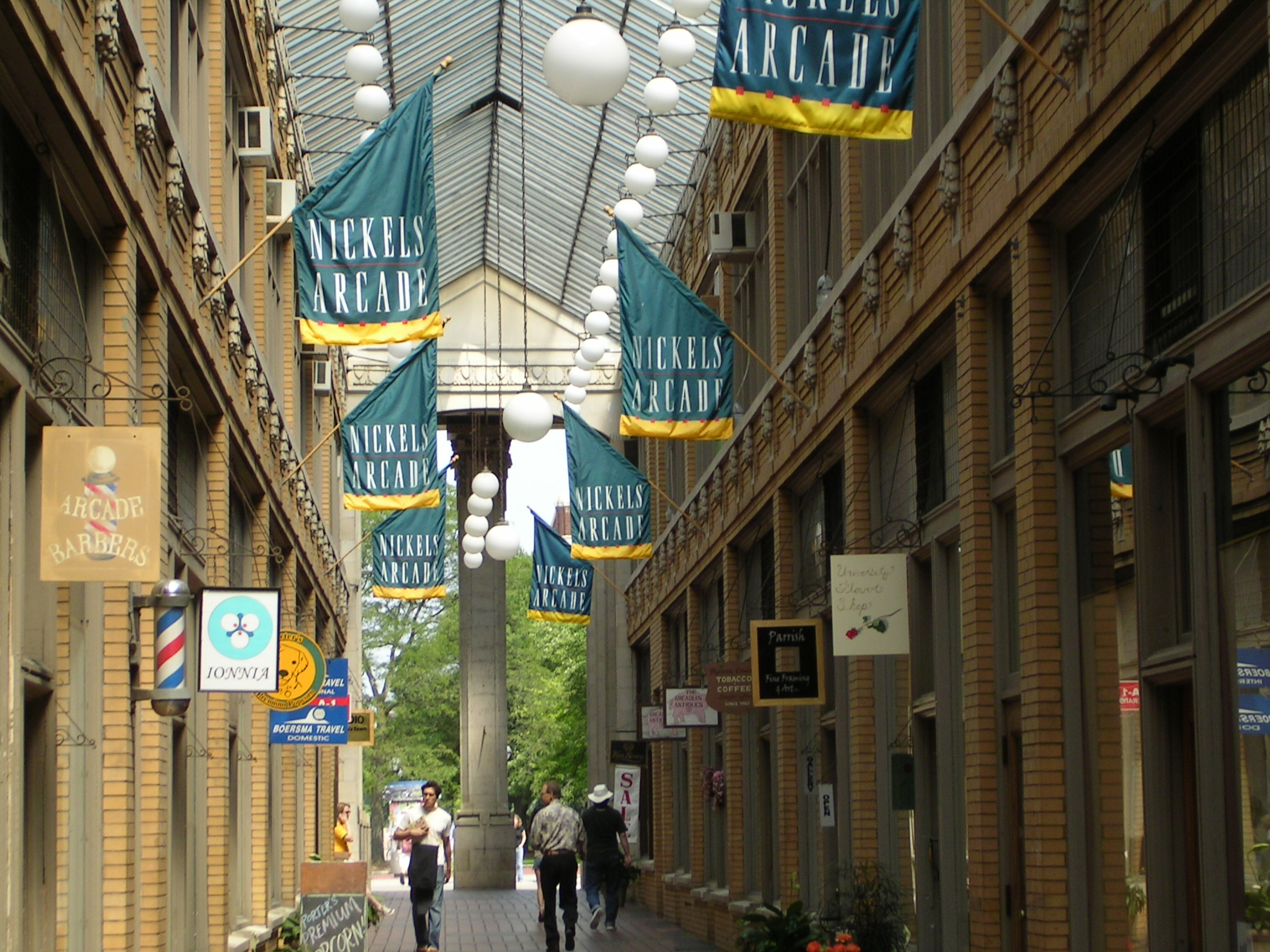 Nickles Arcade in Ann Arbor, Michigan